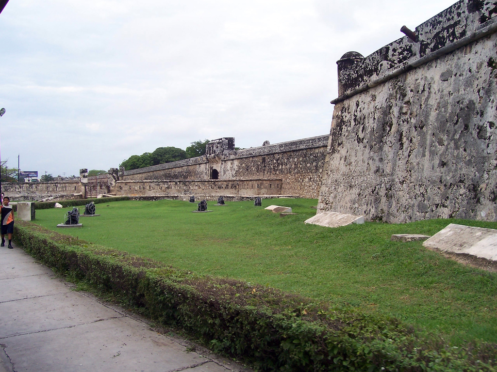 Centro Histórico de San Francisco de Campeche.